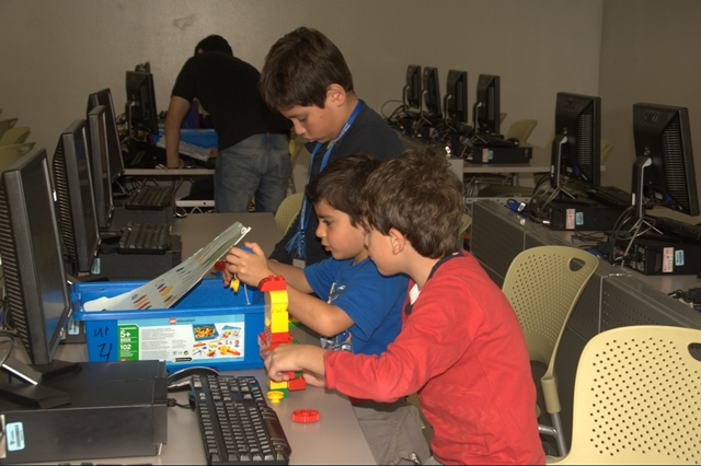 Niños en taller de verano sobre robótica en el ITESM Campus Ciudad de México